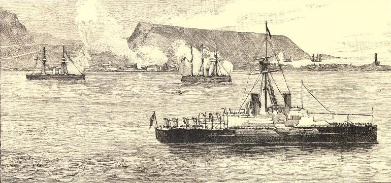 Bombardeo de Iquiuque, page 78